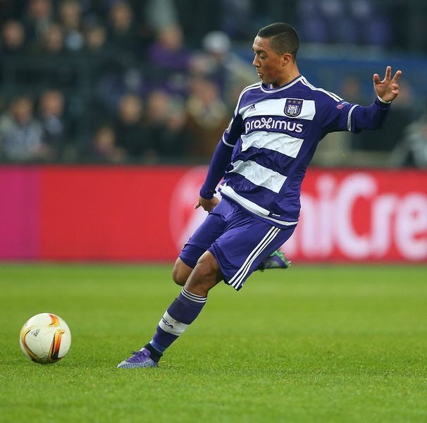 Юрі Тілеманс - футболіст ФК Андерлехта